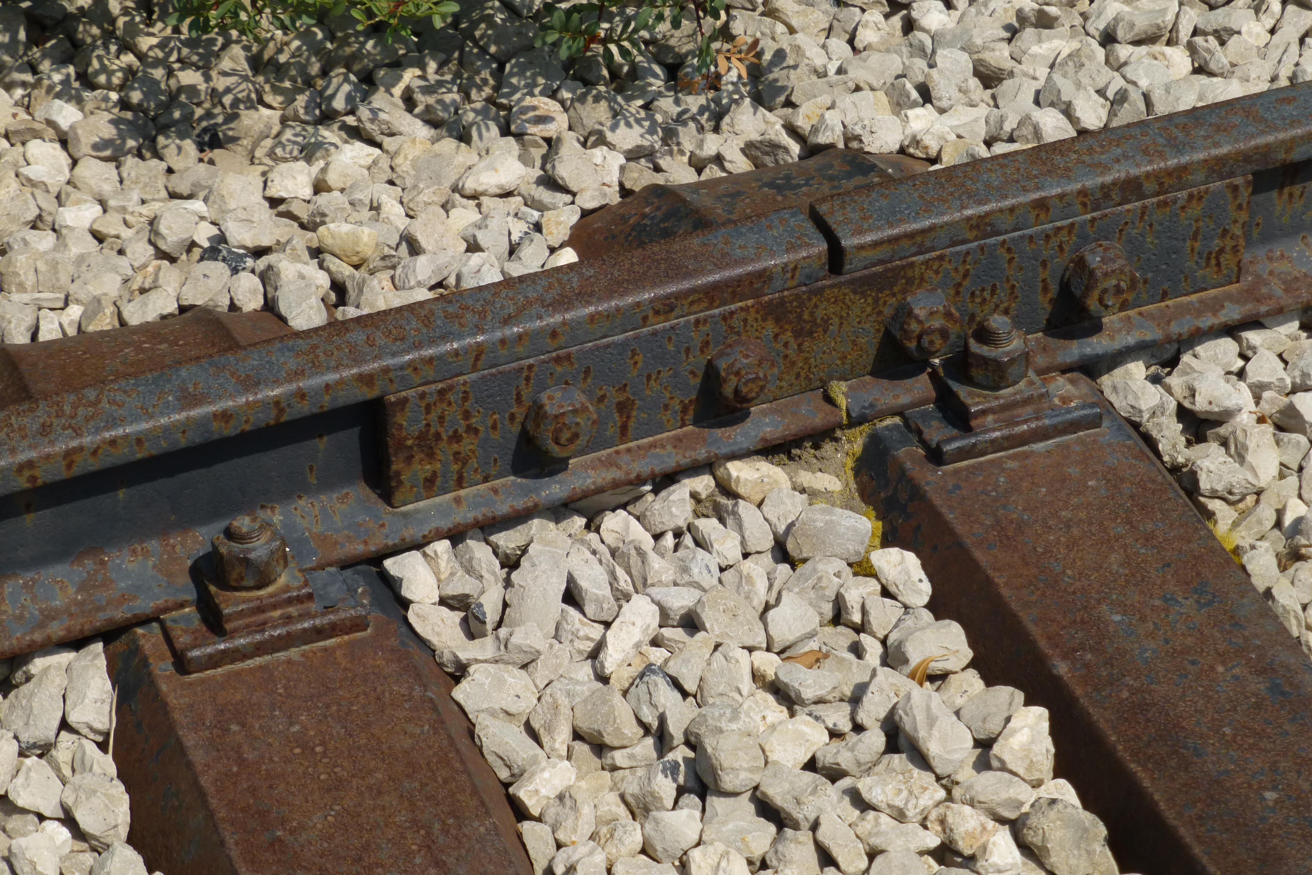 רכבת העמק - מעבירי מים והסוללה - צומת העמקים